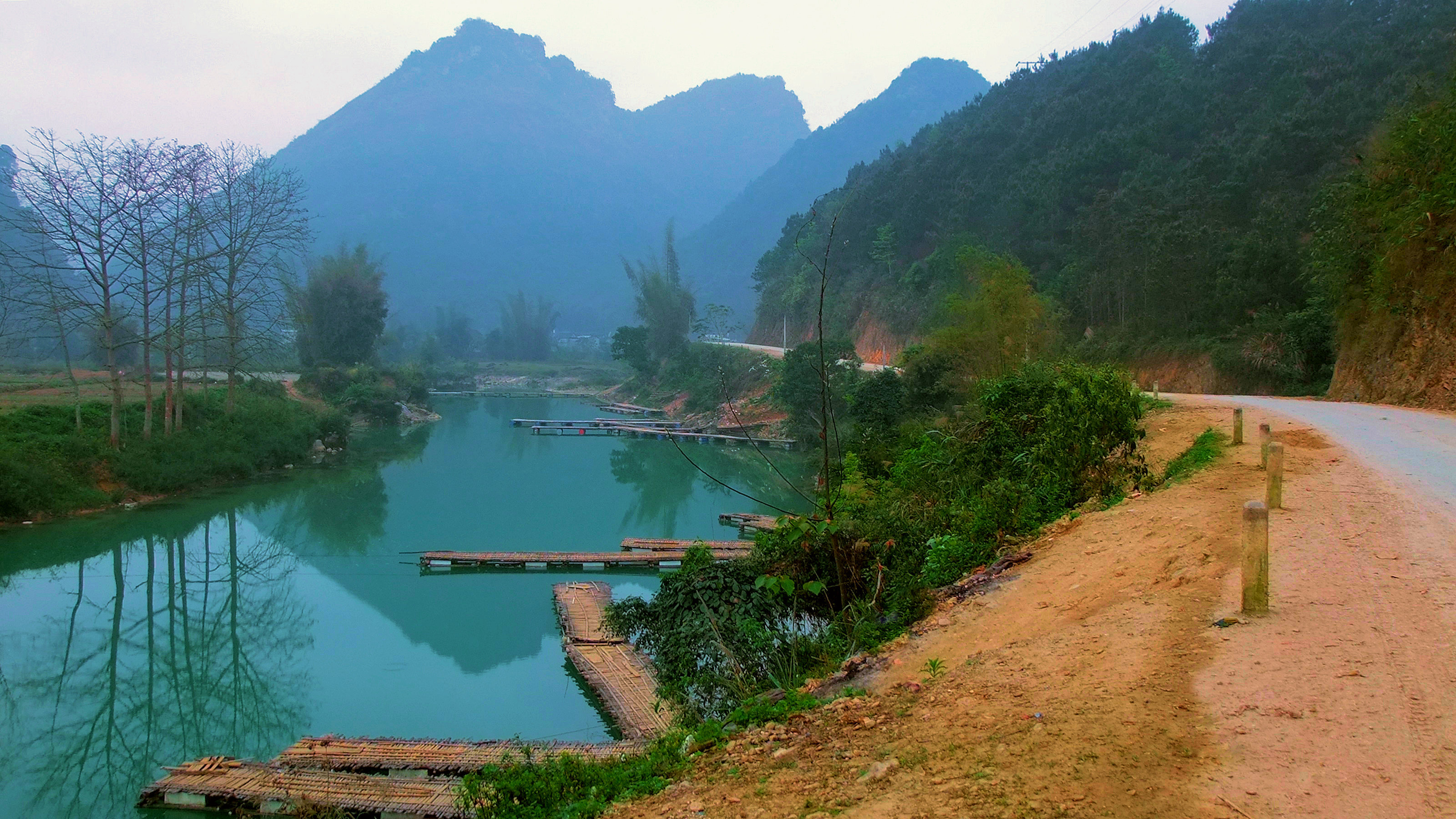 Sông Quây Sơn đường biên giới